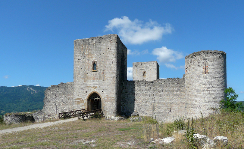 Situé une colline, il surplombe le village et son lac. Sa construction daterait du XII° siècle, ses seigneurs pratiquaient le catharisme. Il subit un siège de trois jours par l'armée de Thomas Pons de Bruyère, un lieutenant de Simon de Montfort. Puivert devient une possession royale et de nombreux troubadours viendront séjourner au château.